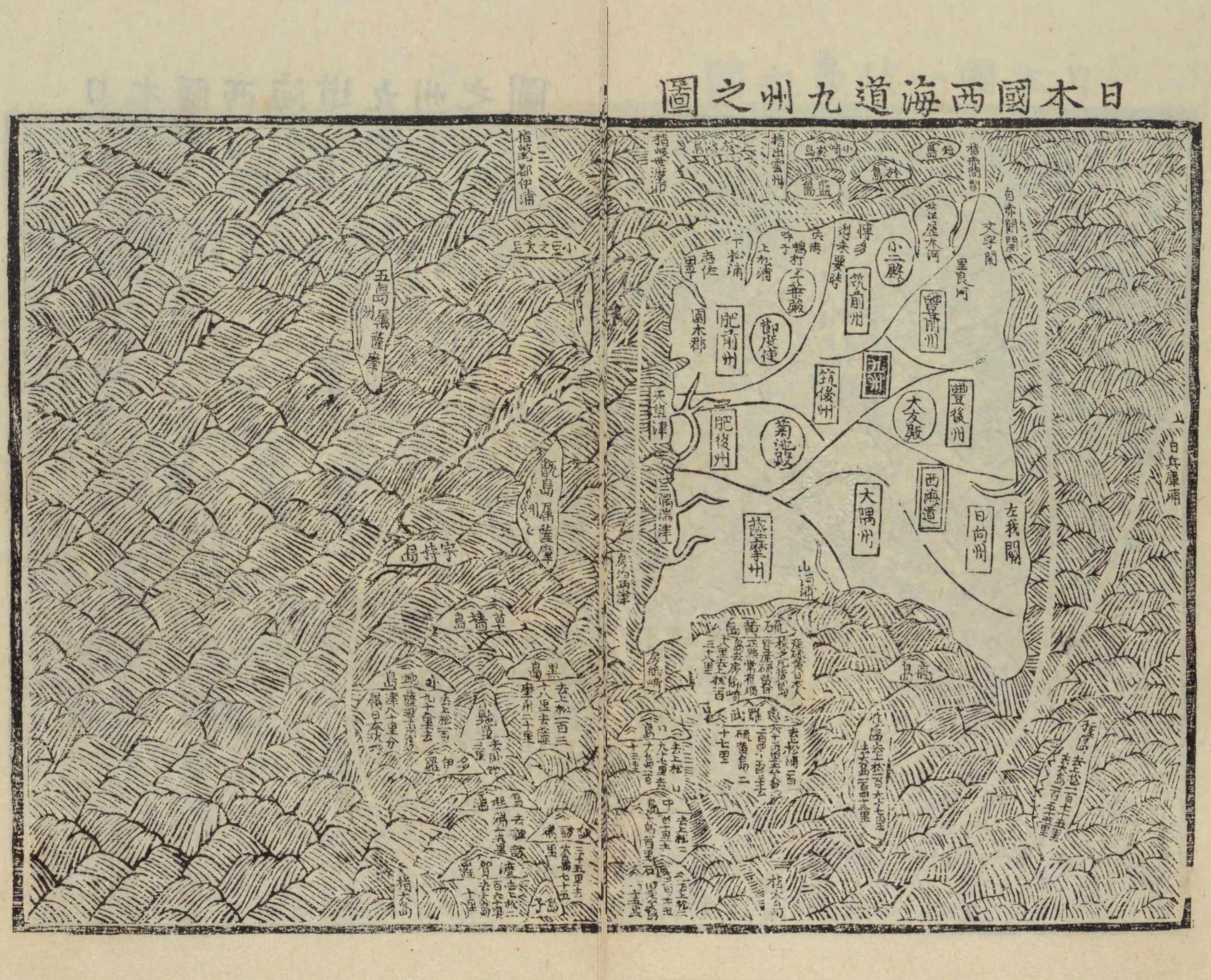 国立国会図書館デジタルコレクション所収